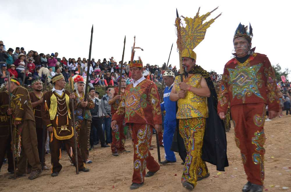 Representan a los jefes guerreros de tribus conquistadas.